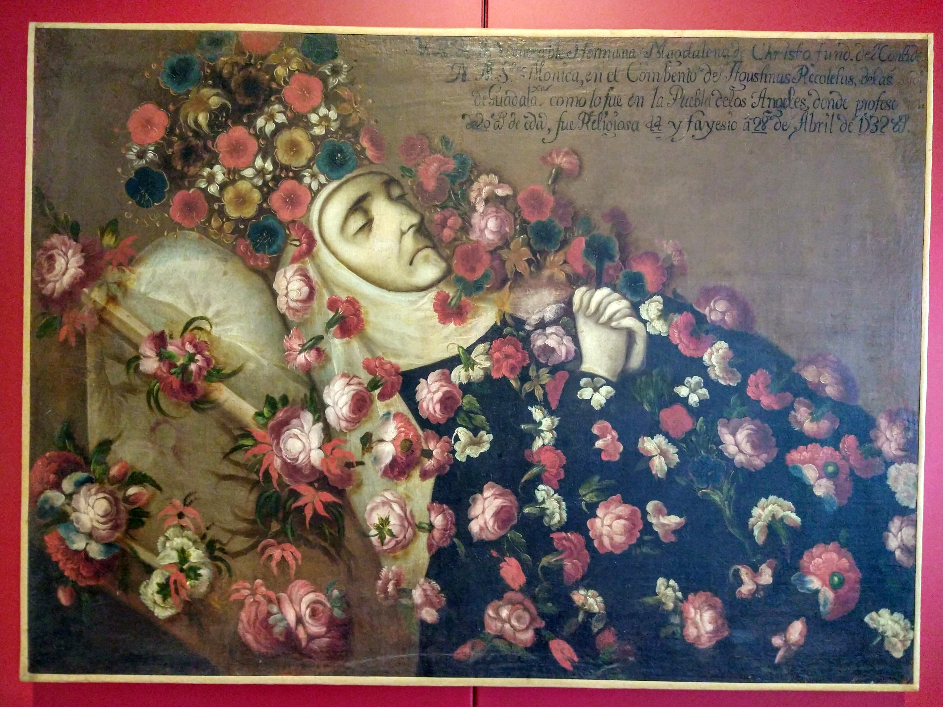 Sor Magdalena de Cristo, monja coronada, 1732, óleo sobre tela. Pintura de autor desconocido en el Museo ex-convento de Santa Mónica.